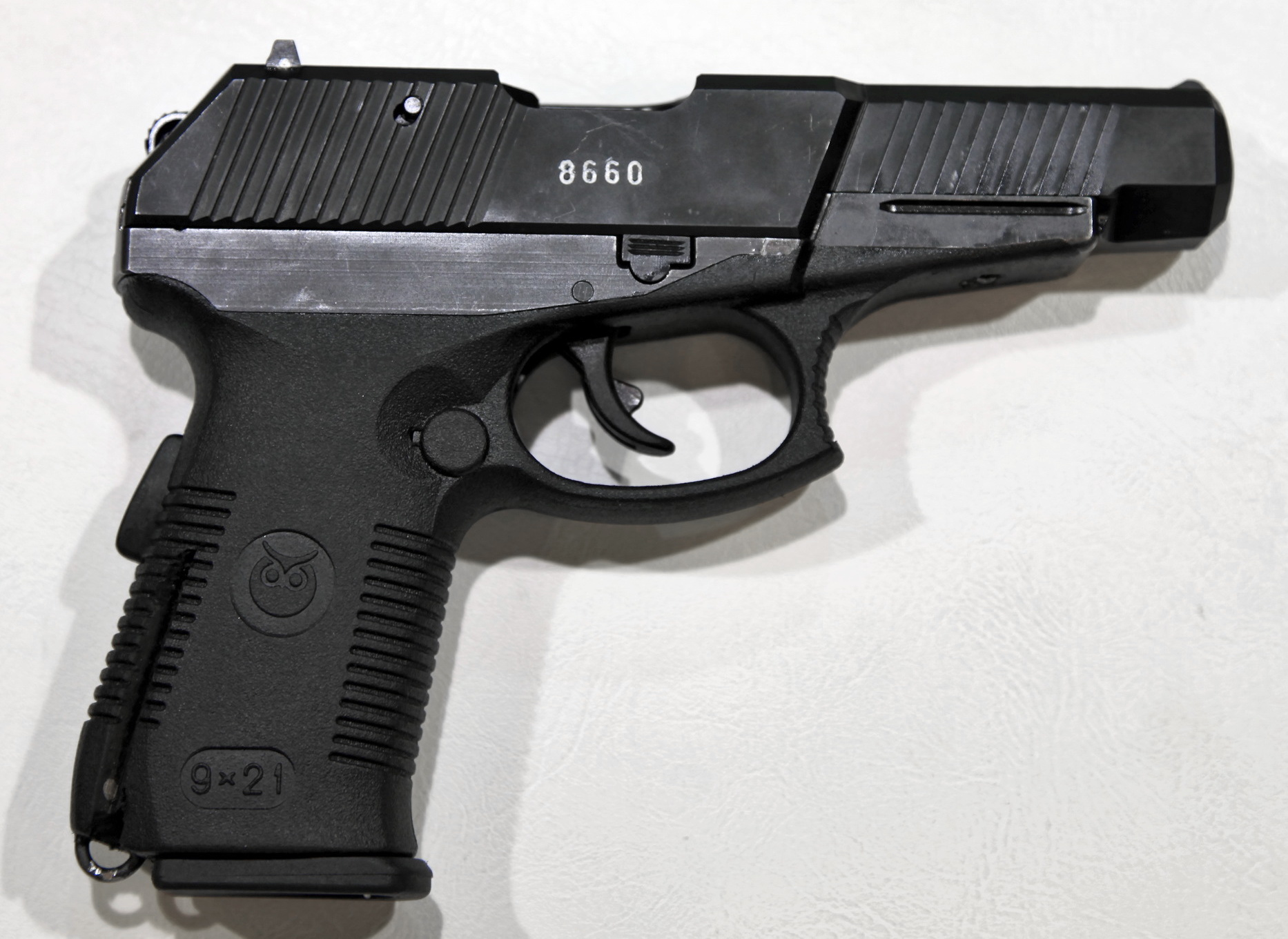 9-мм пистолет СР1ПМ